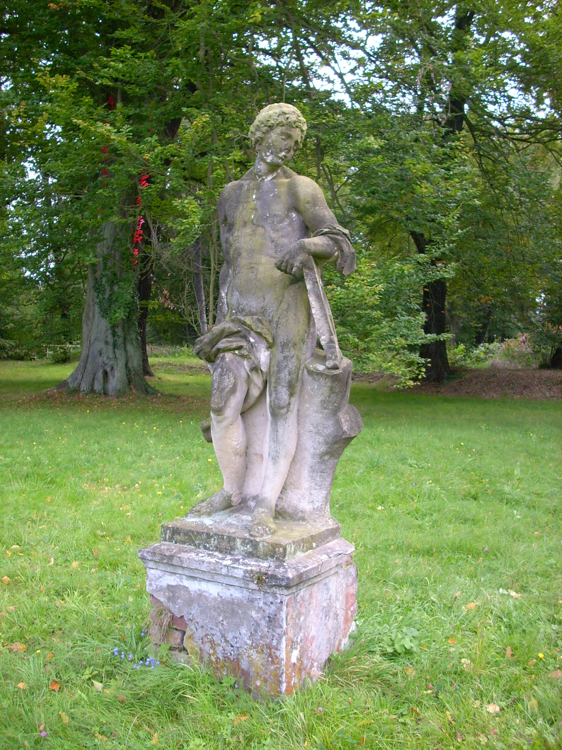 Skulptur im Schlosspark in Uhyst